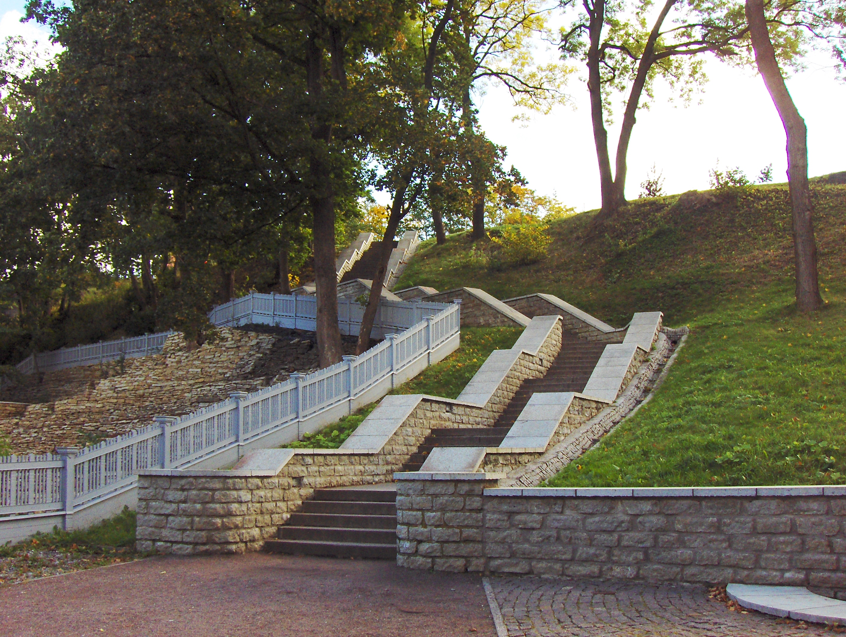 Tallinn